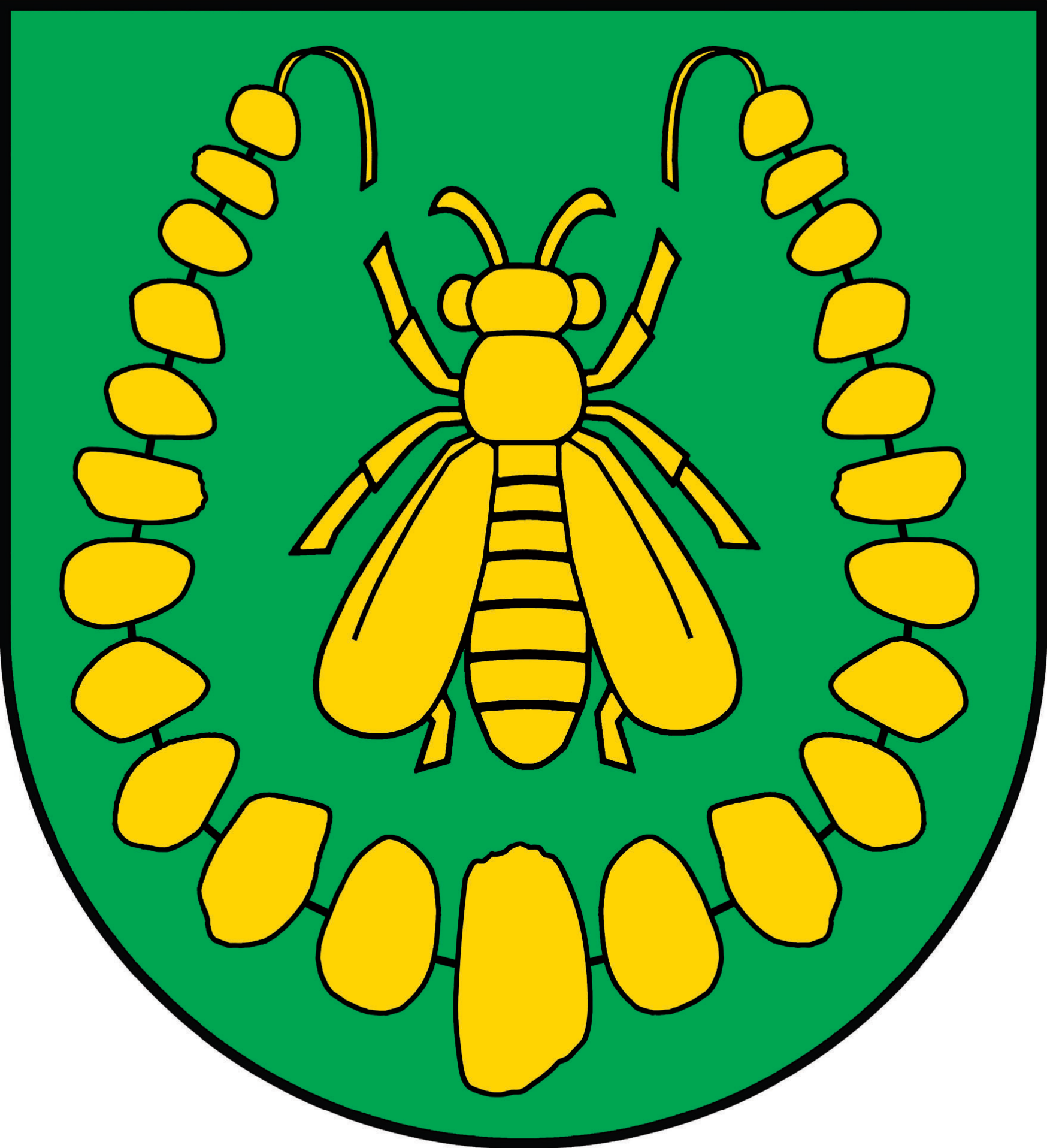 Herb gminy Turośl